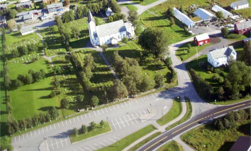 Åfjord kirkegård sett fra luften, prestegården til høyre. Tatt fra et modellfly.